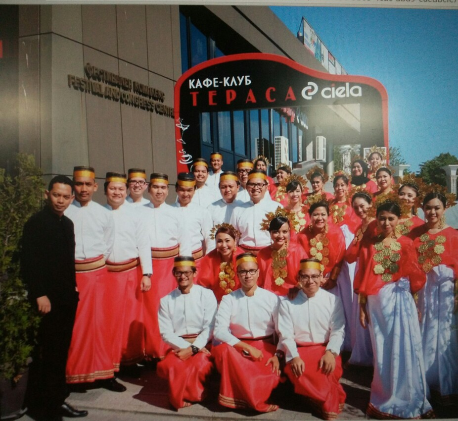 The Archipelago Singers dengan Baju Bodo 'Merah Putih' di Varna